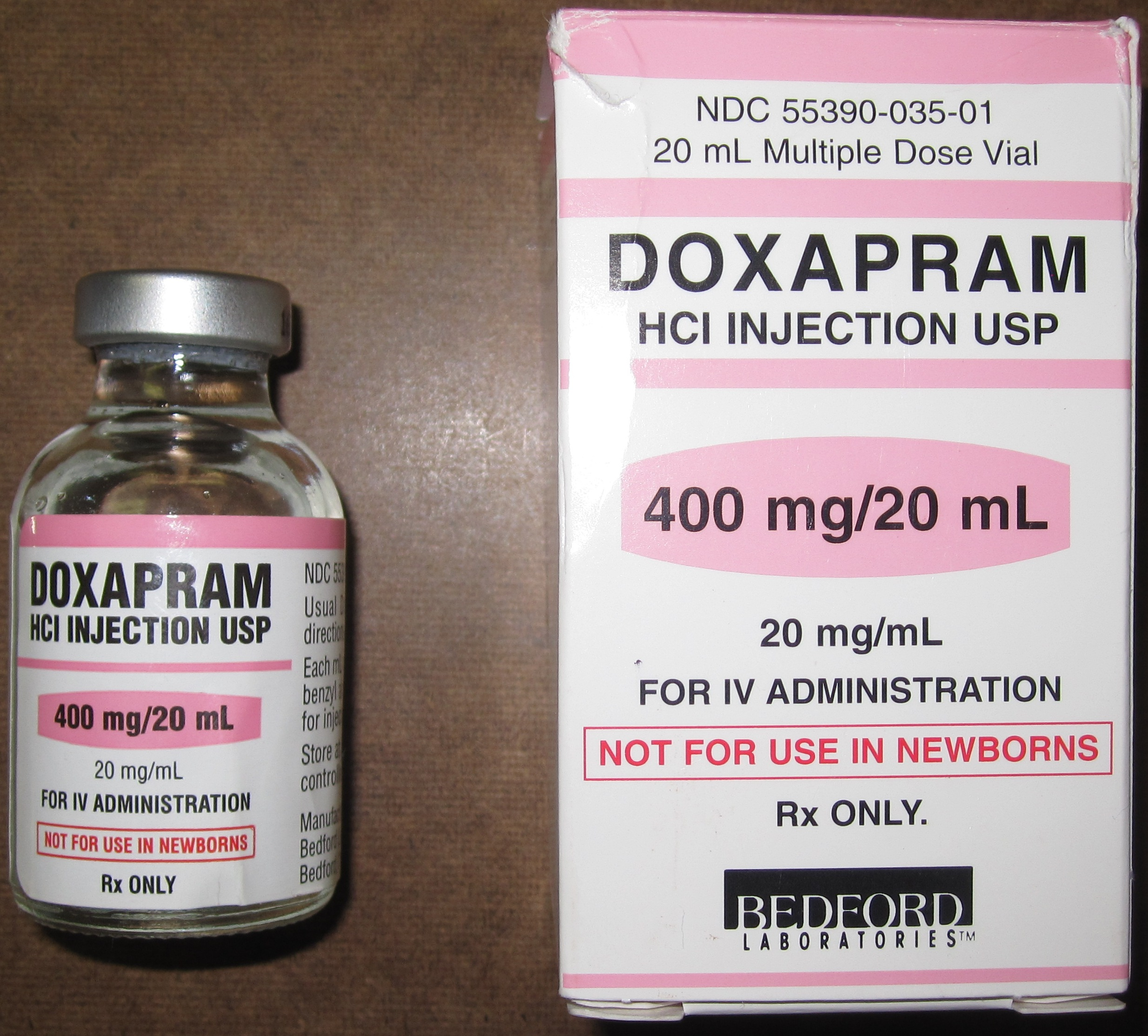 A vial of doxapram